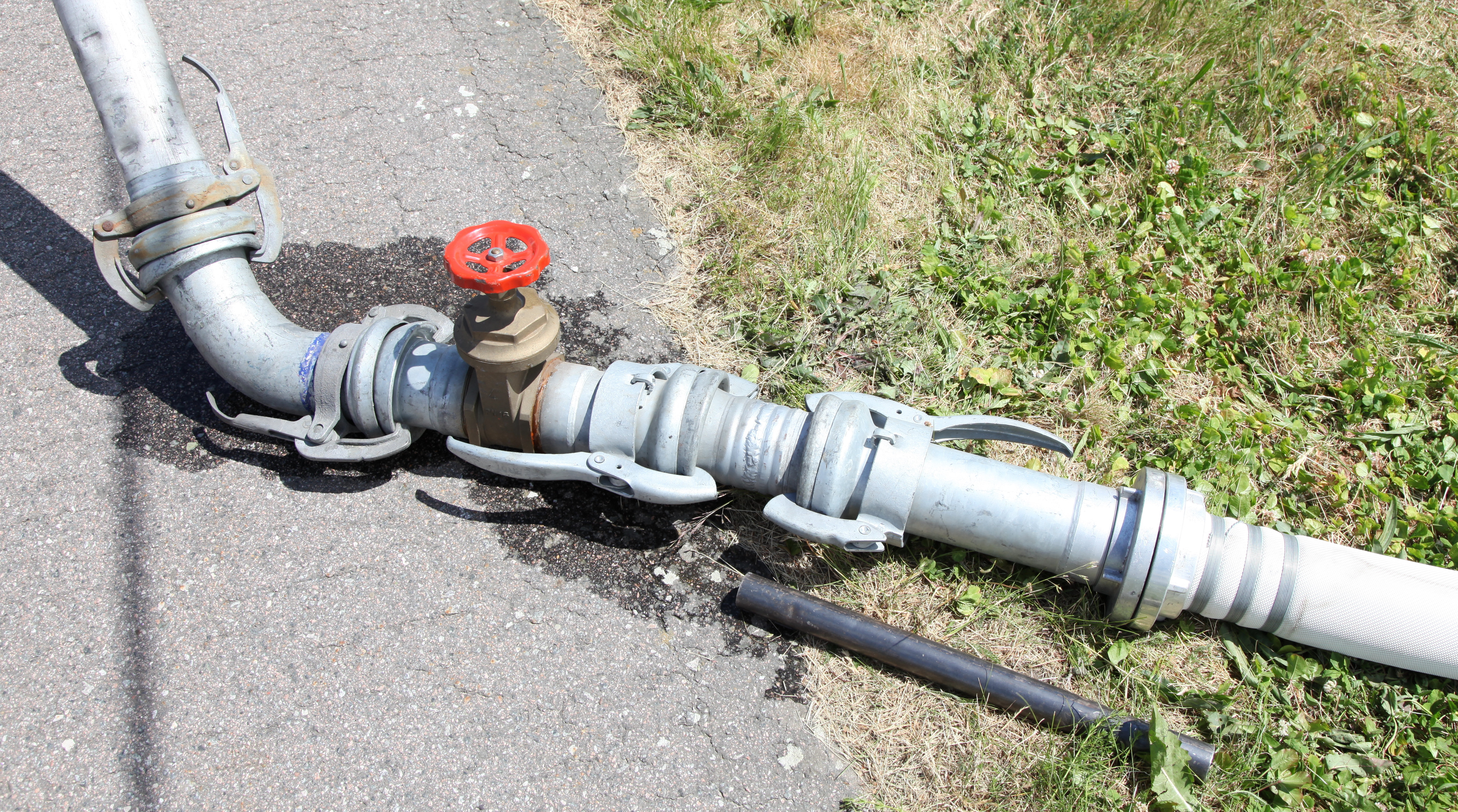 Verschiedene Elemente eines Schnellkupplungsrohres: Bogen, Schieber, Adaper, Storz-Kupplung